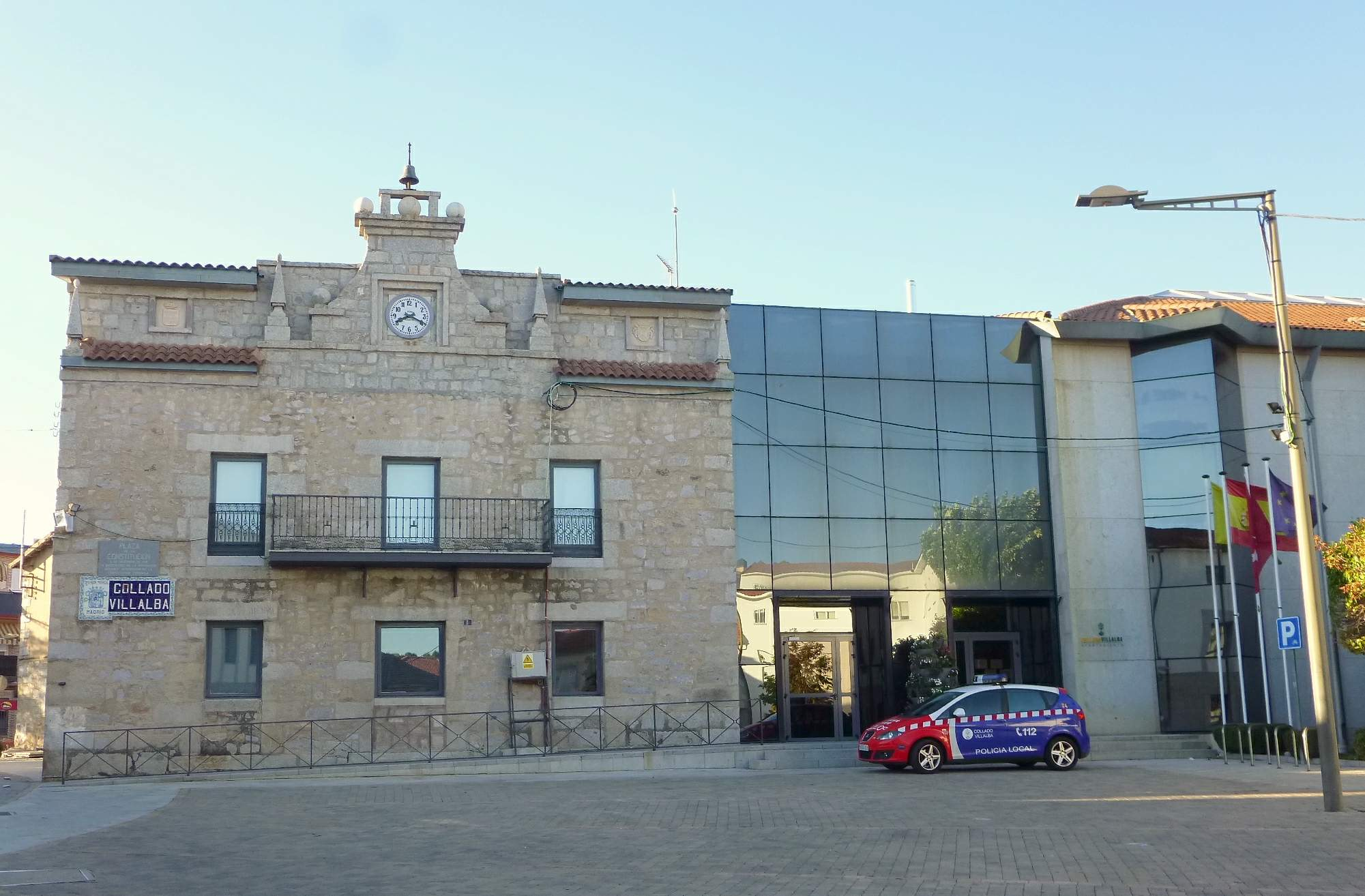 Collado Villalba (Madrid) - Ayuntamiento